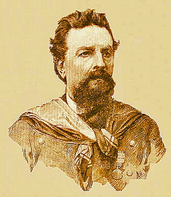 Il generale Giacomo Medici (1887).